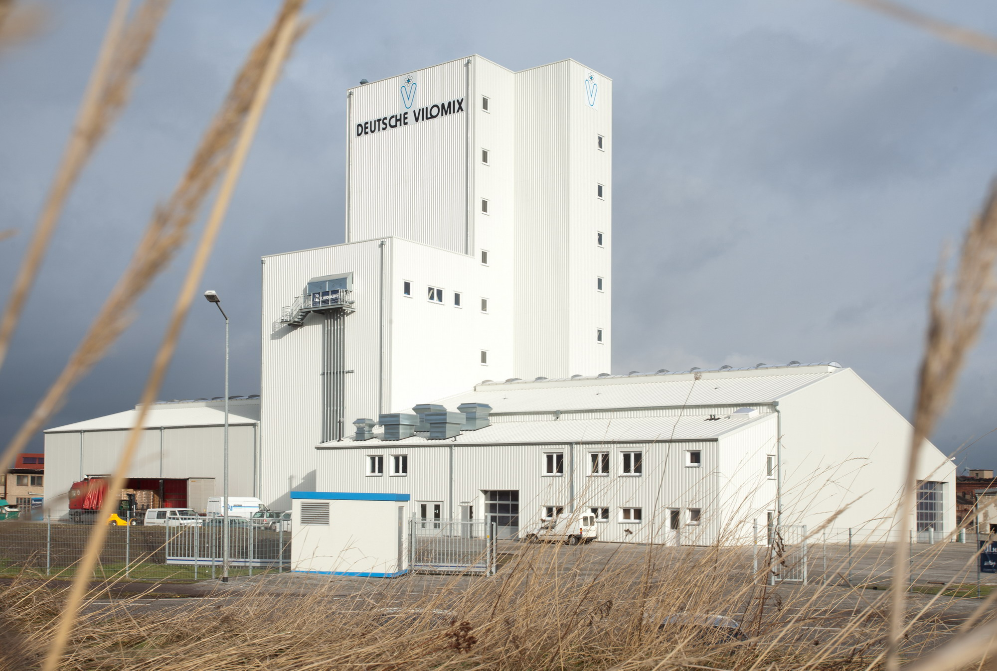 Europas modernstes Futtermittelwerk in Haldensleben.